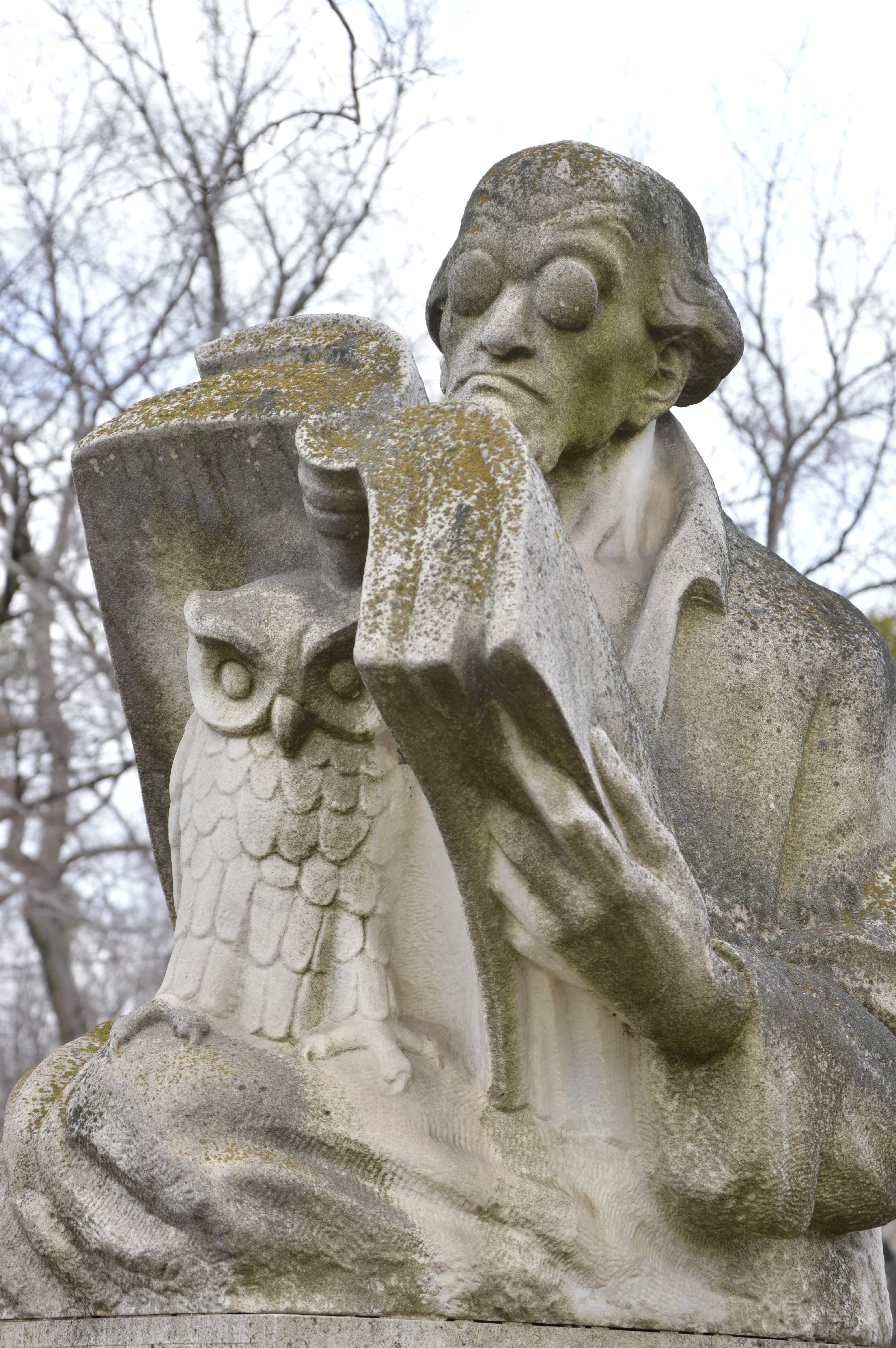 Czakó Adolf, Zwick (Pest, 1860. február 4. – Budapest, 1942. január 28.) mérnök, műegyetemi tanár sírja Budapesten. Kerepesi temető: 11-5-9 [szobrász: Bory Jenő]